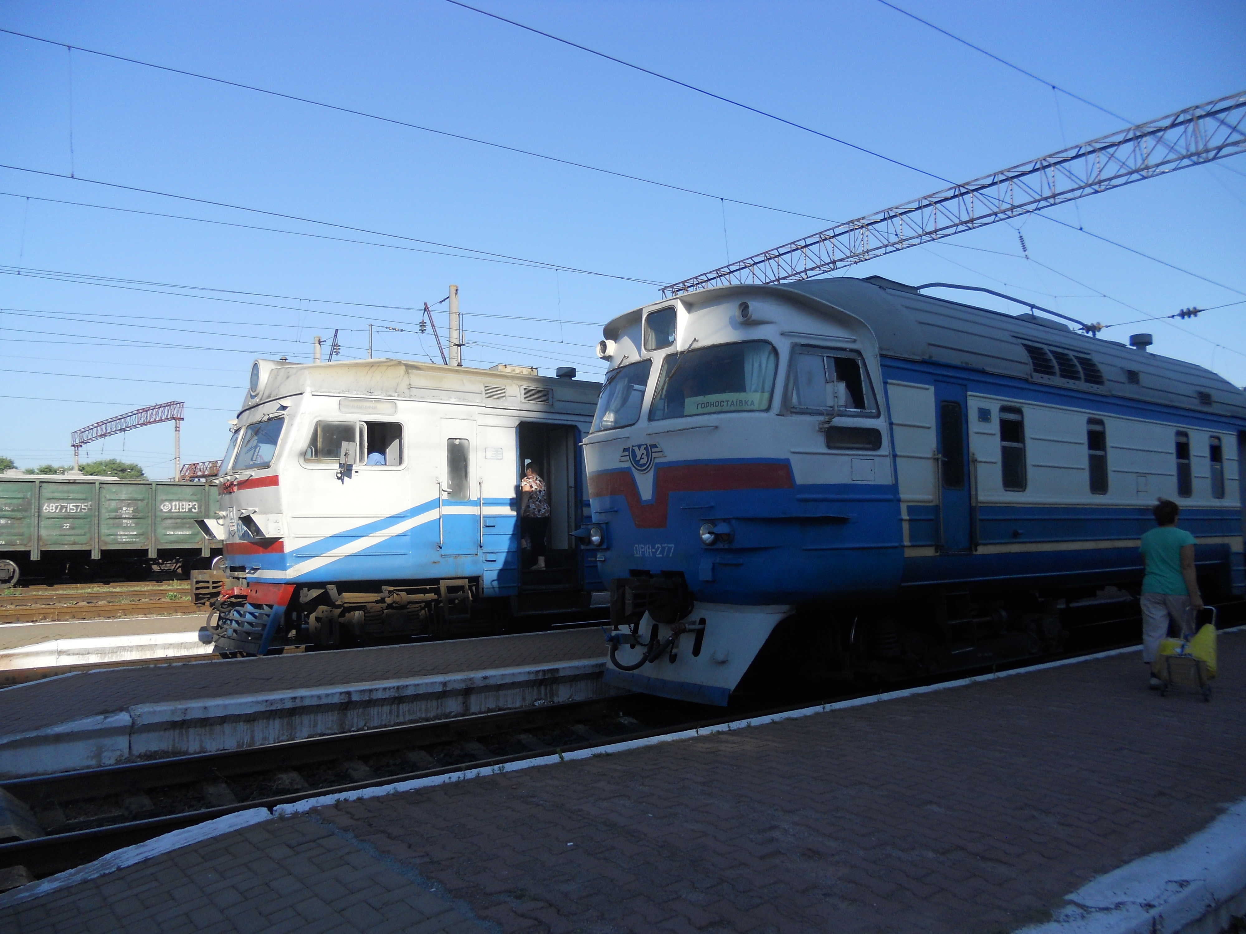 Чернігівський залізничний вокзал, електричка ЕР9Т-667 та дизель ДР1А-277. Електричка до Неданчичів, дизель до Горностаївкаи